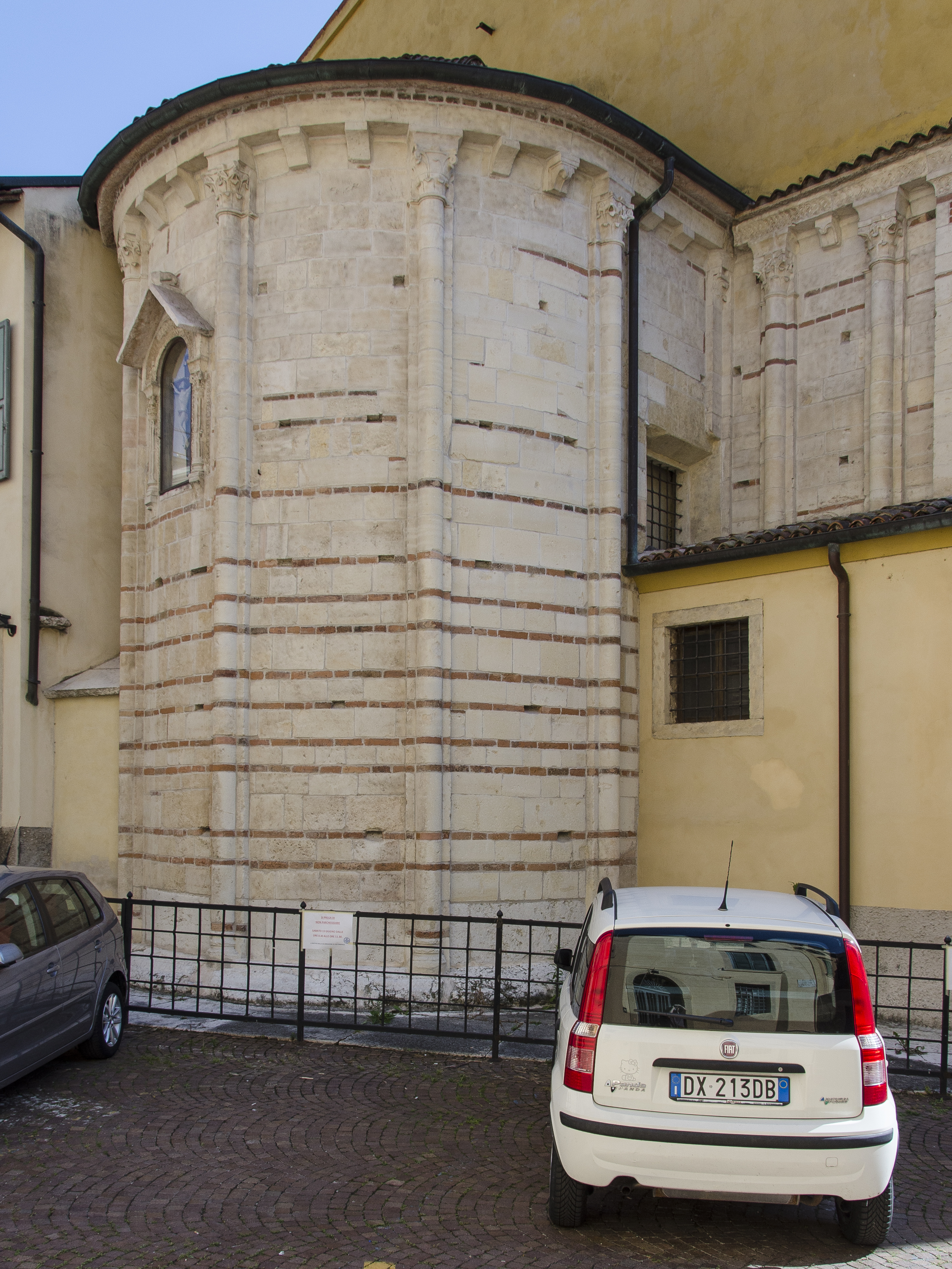 Chiesa dei Santi Apostoli a Verona, abside